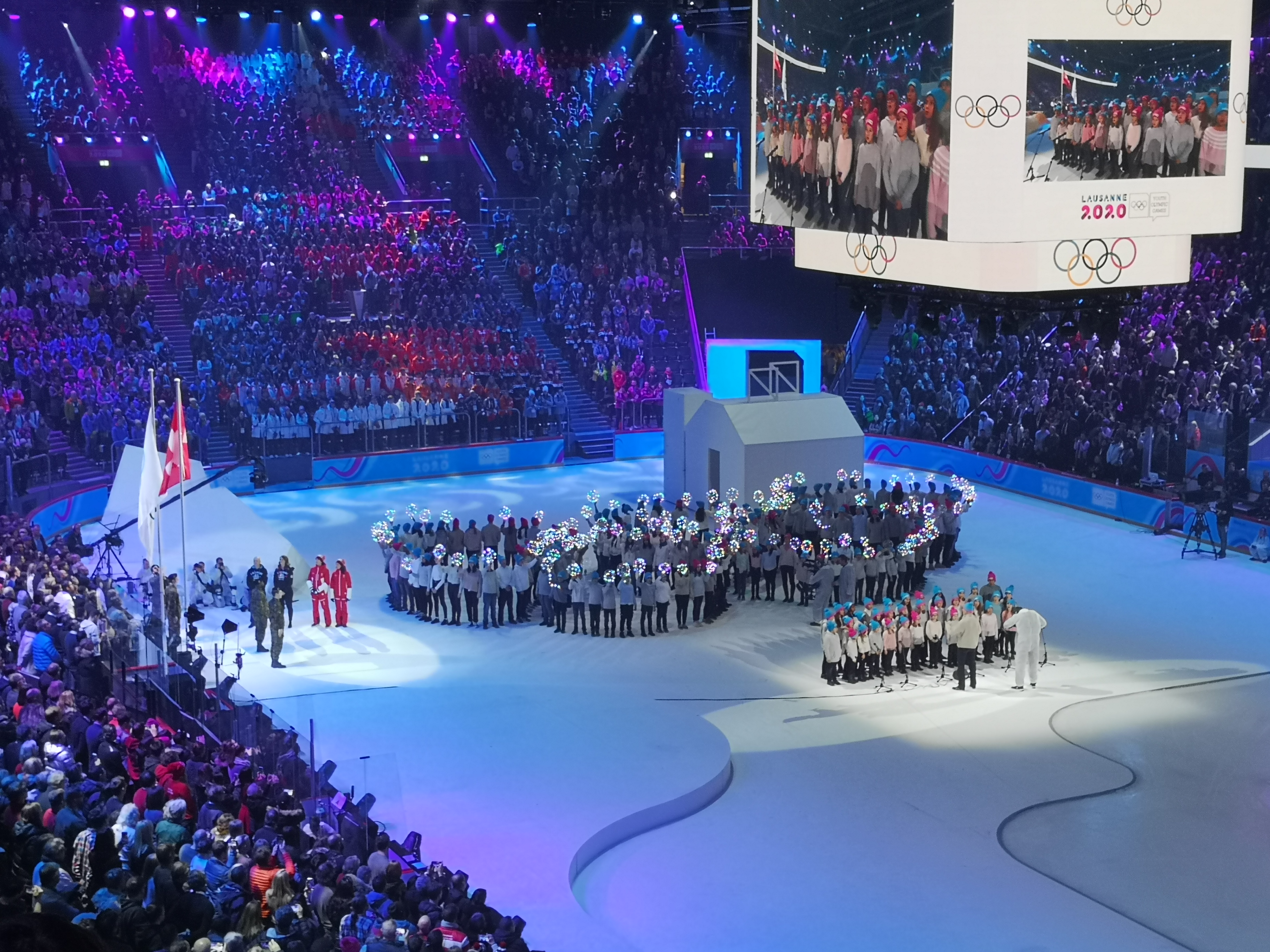 Interprétation de l'hymne olympique pendant la cérémonie d'ouverture des JOJ 2020.